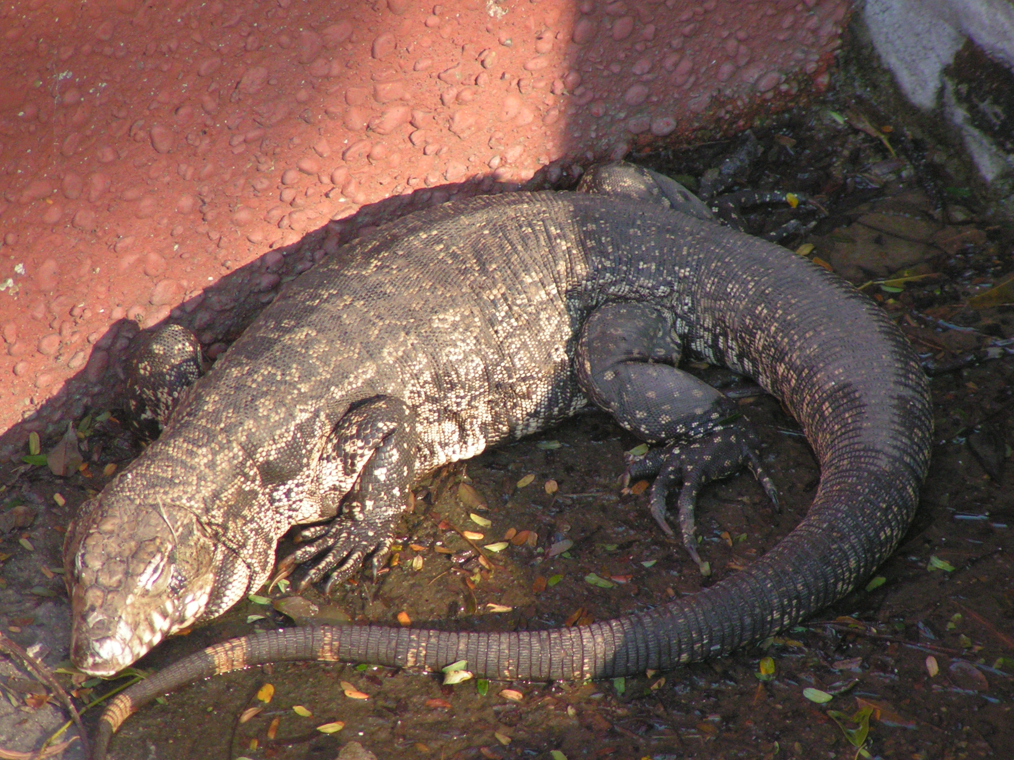 Iguana overa (Tupinambis merianae)